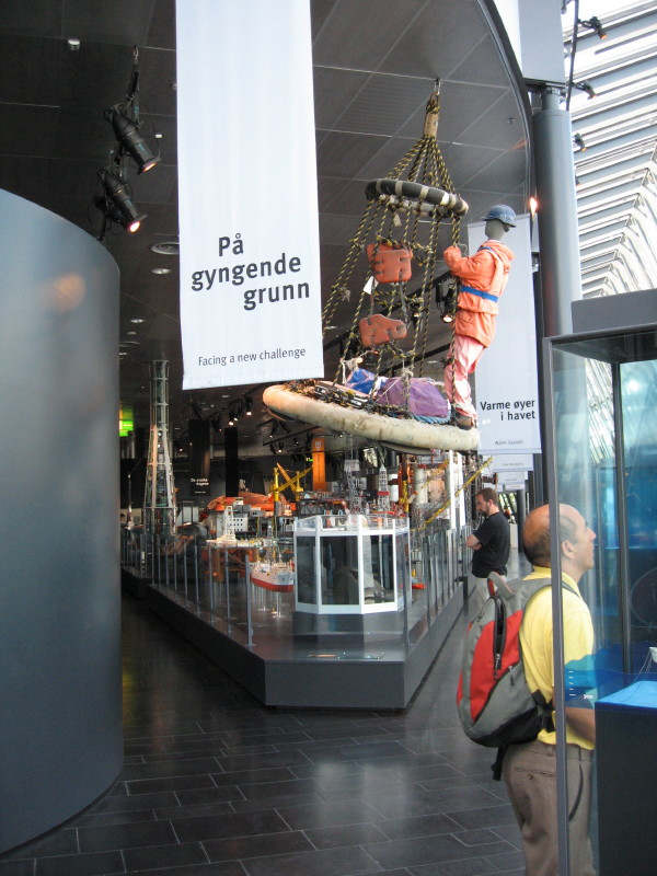 Norwegian Oil Museum Stavanger - inside